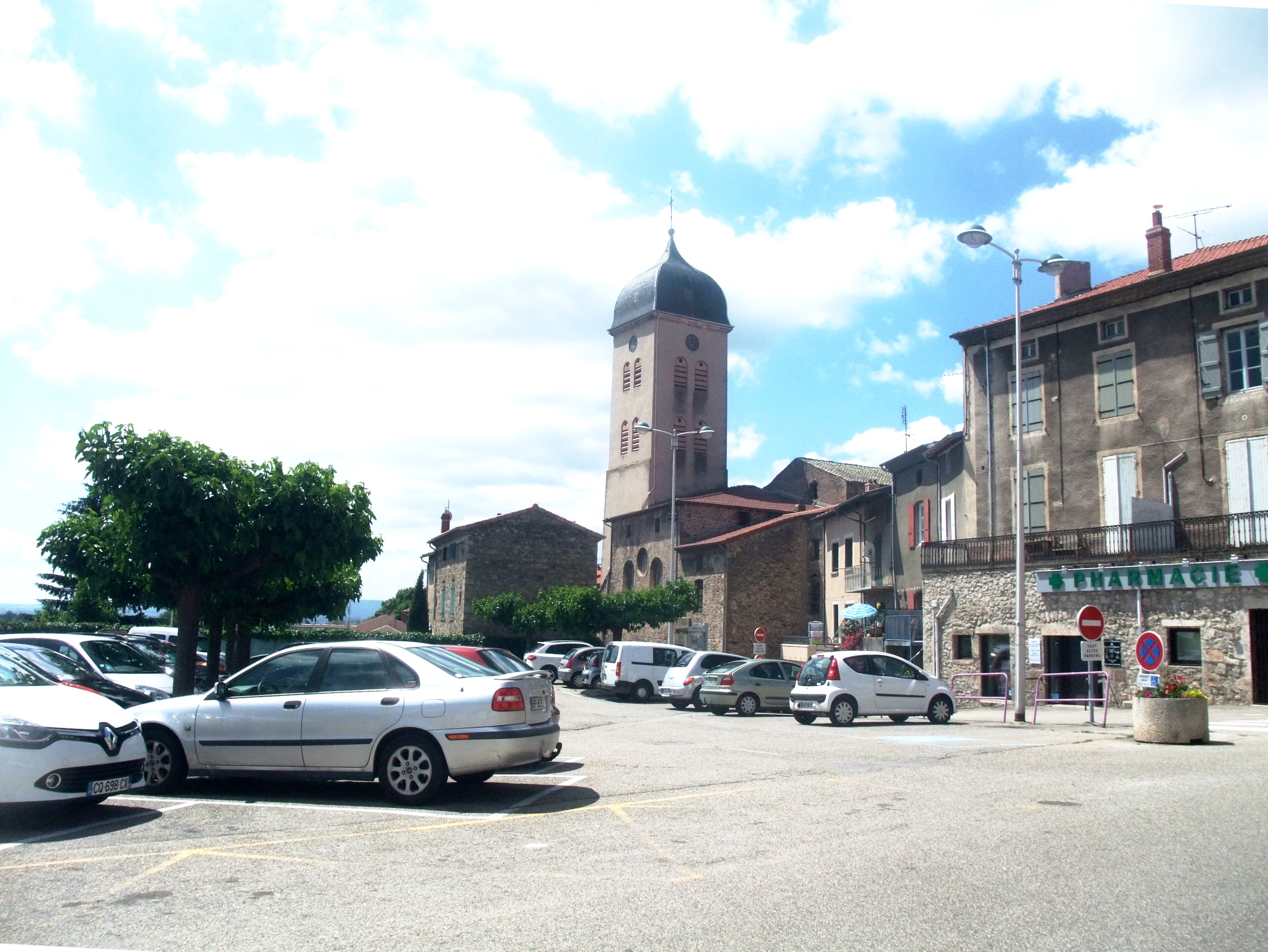 Boulieu place église cloche